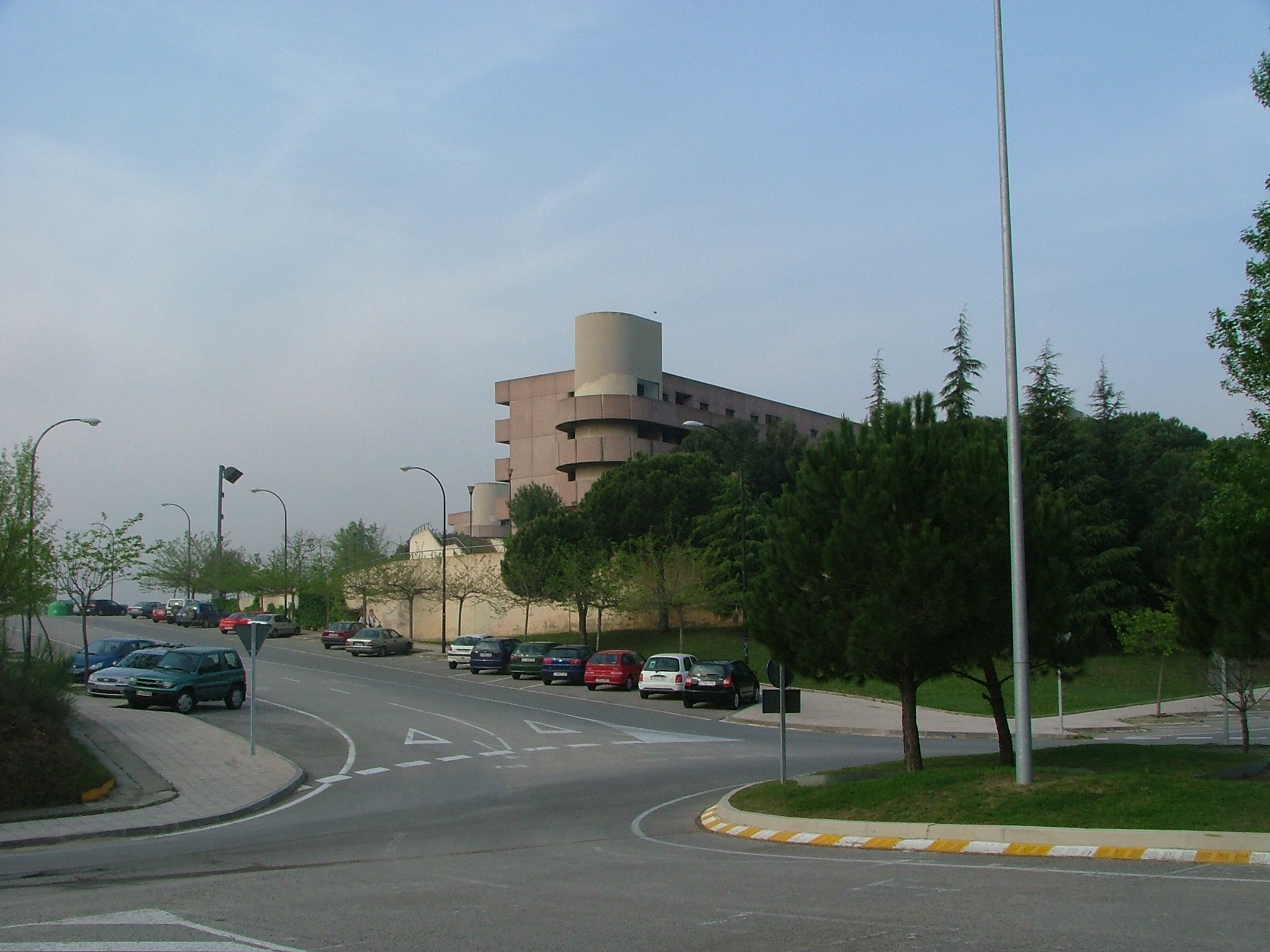 Vila Universitària,UAB Bellaterra,Catalonia,Spain